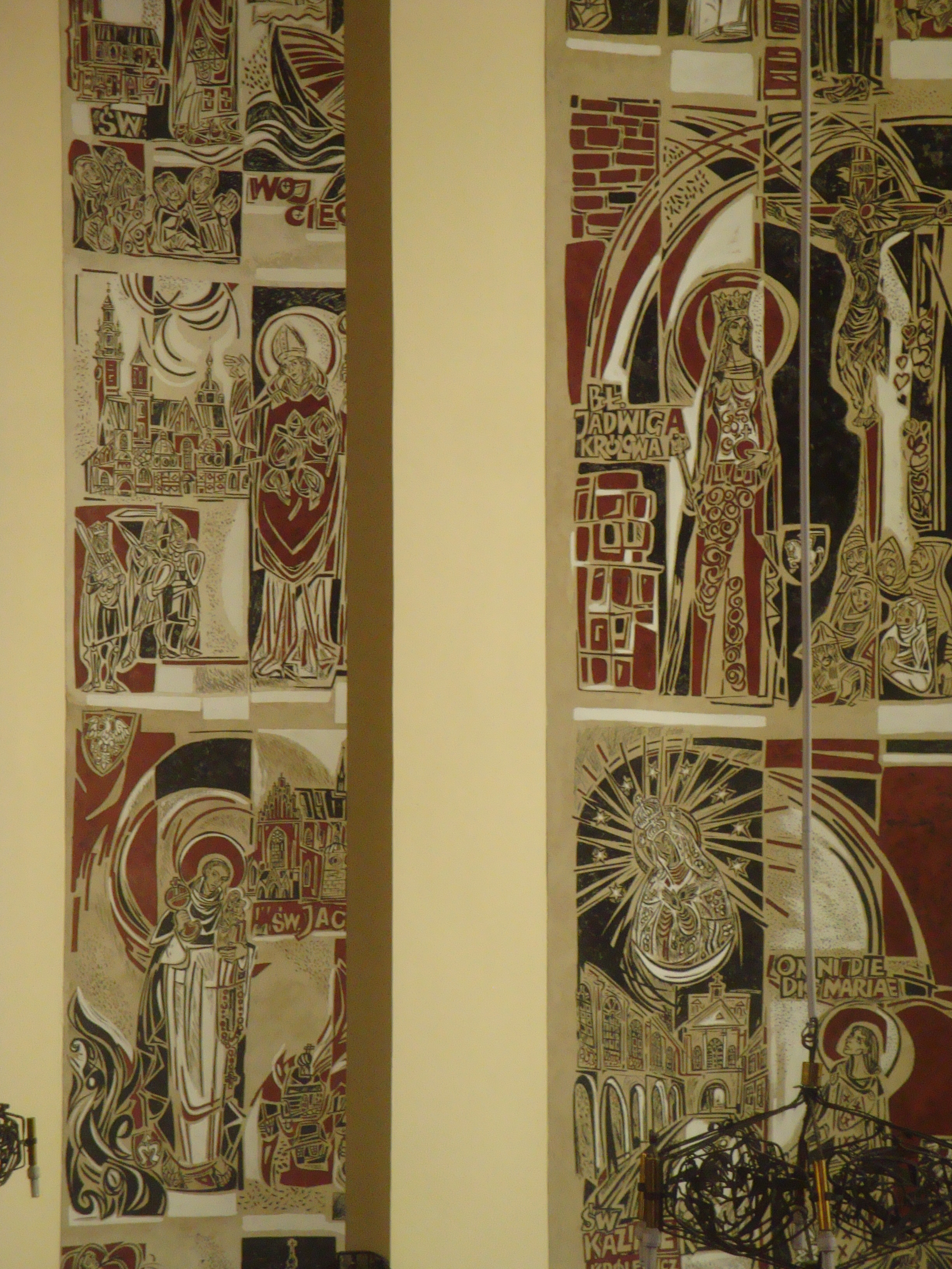 Kościół Matki Bożej Nieustającej Pomocy w Tarnobrzegu-Serbinowie